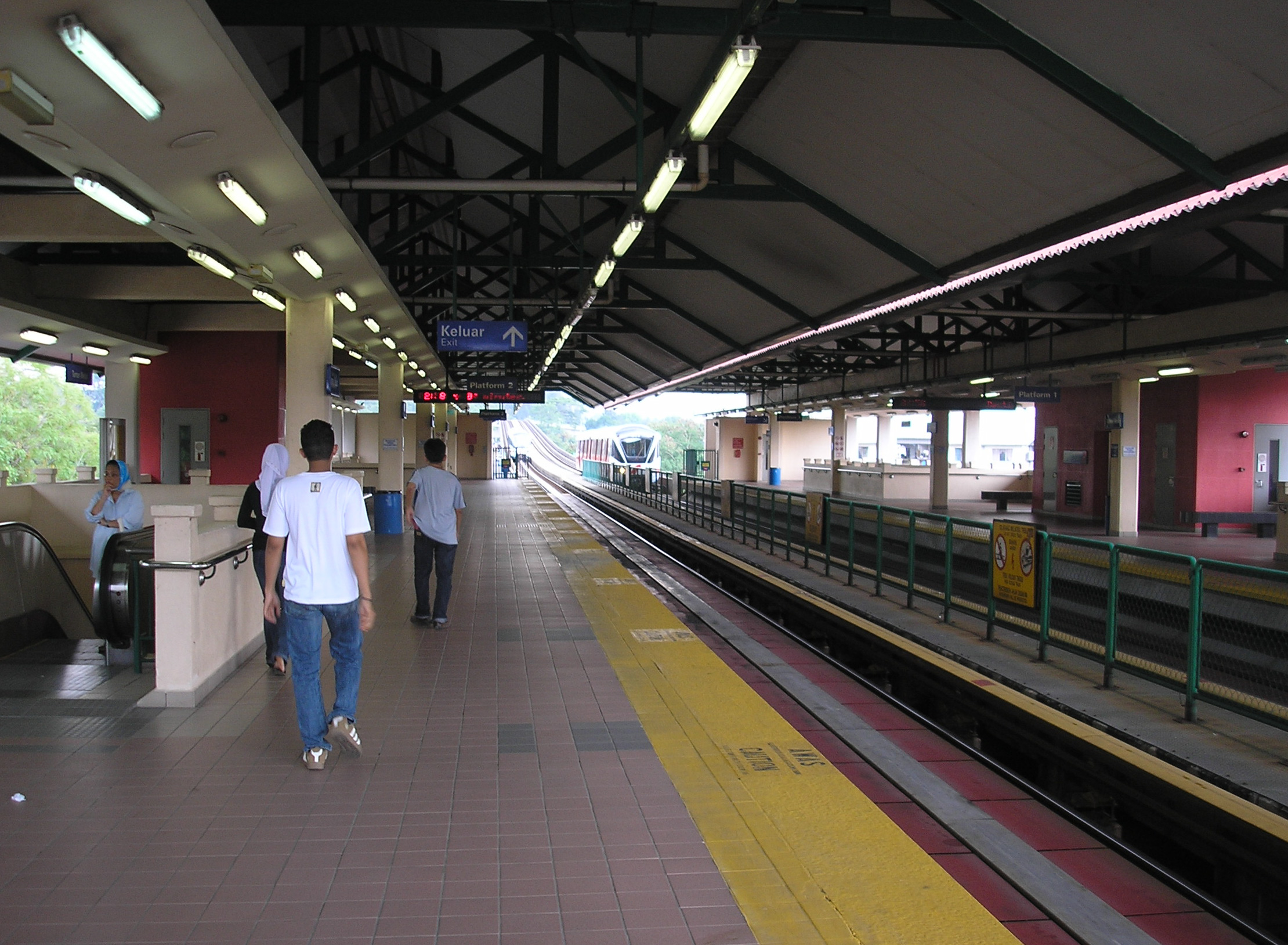 The Taman Melati LRT station (Kelana Jaya Line), Kuala Lumpur, Malaysia.